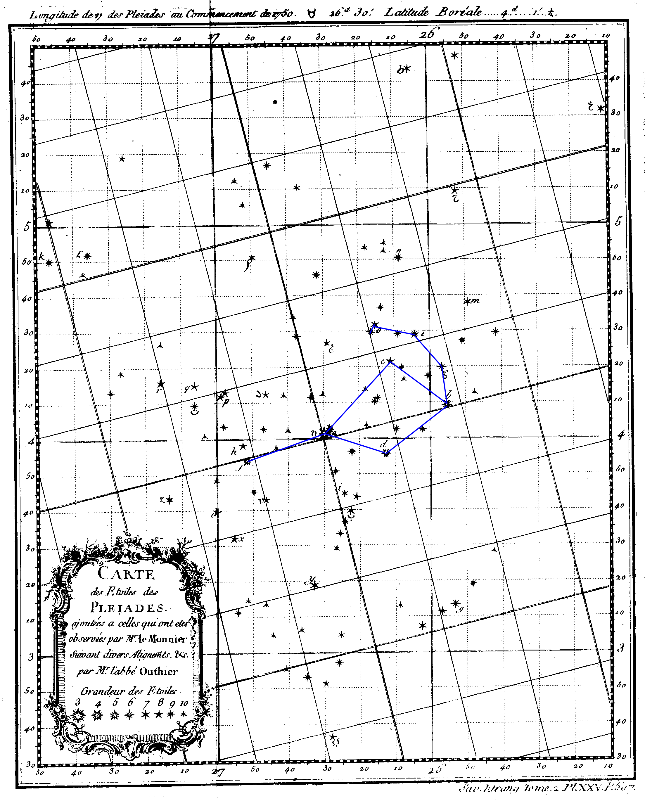 Carte des Pléiades de l'abbé Outhier, 1750 ; les 9 principales étoiles y sont reliées.